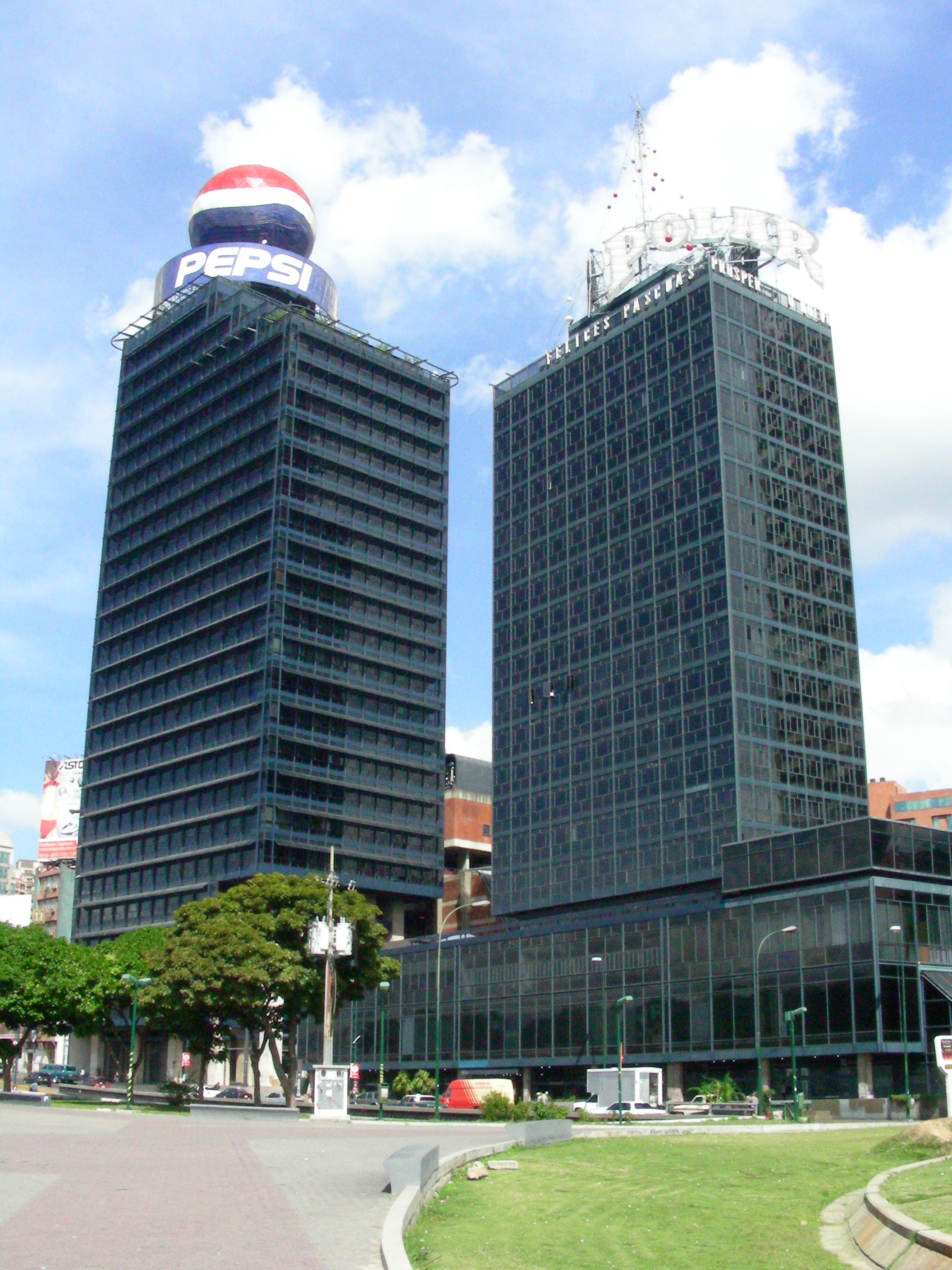 Torre Polar